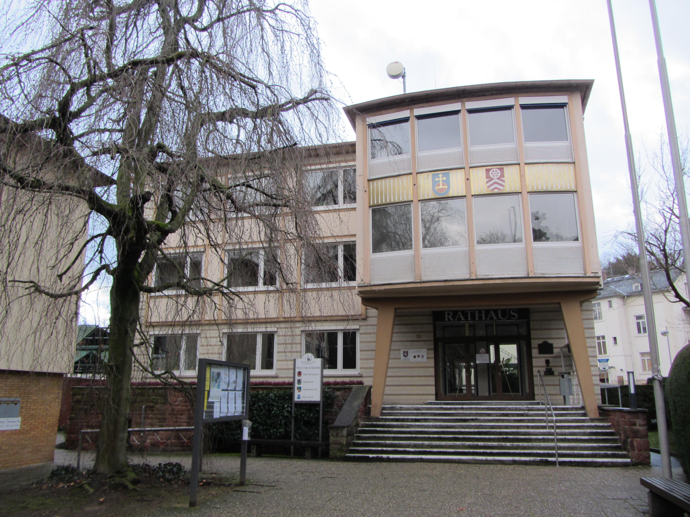 Rathaus der Stadt Bad Soden